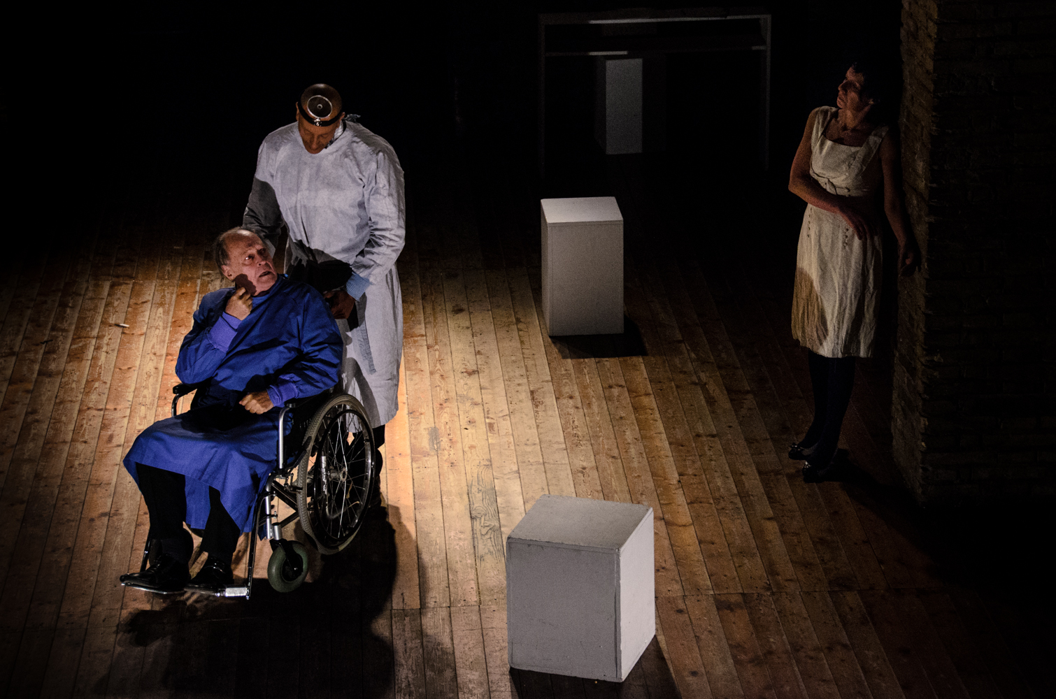 Mario Prosperi, Rossella Or e Yavan Wolde; Dicembre 2012, Teatro Sala Uno, Roma; foto Fabio Gaigher